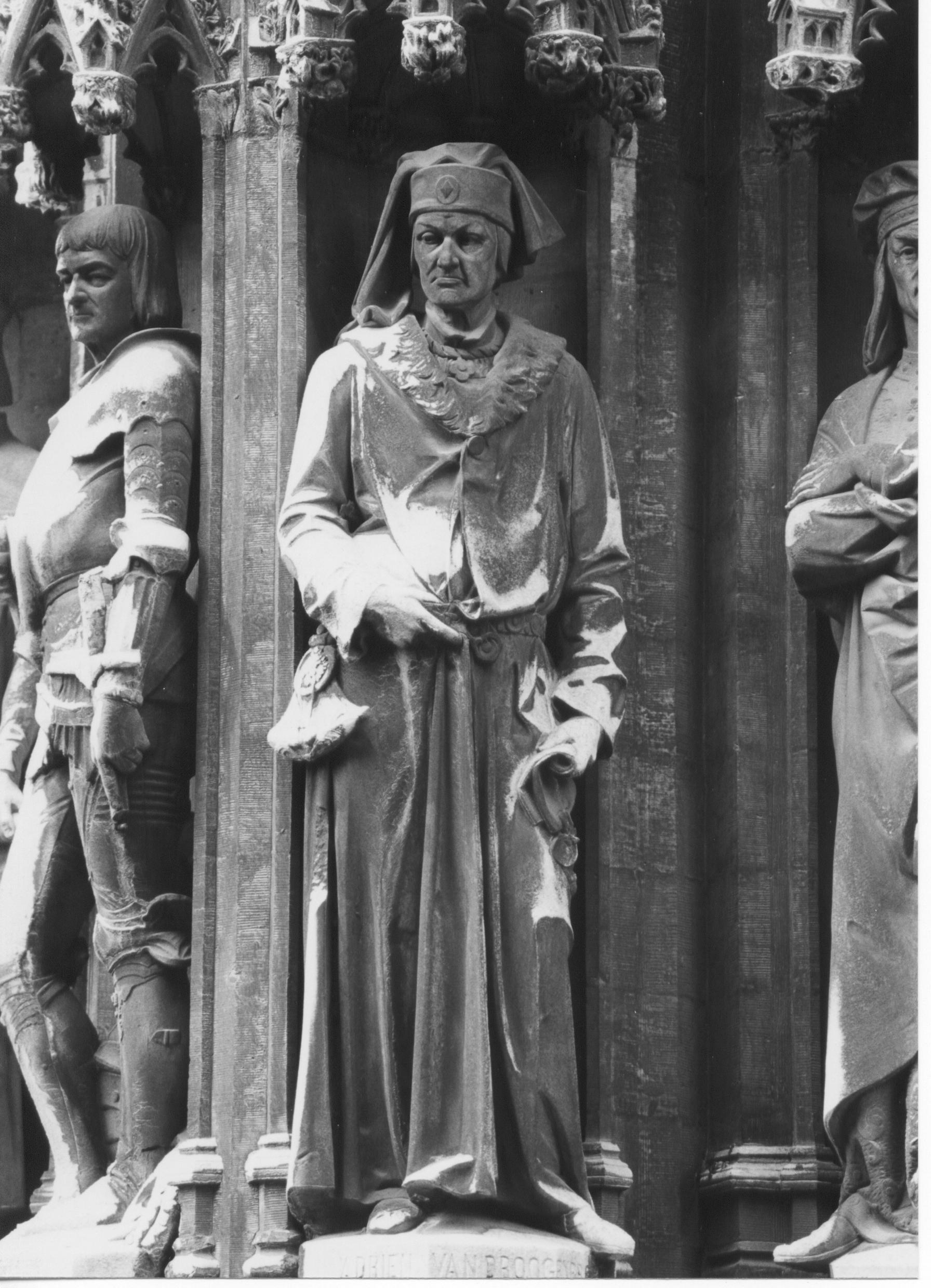 Eigen foto. Witger 6 nov 2005 11:09 (CET)